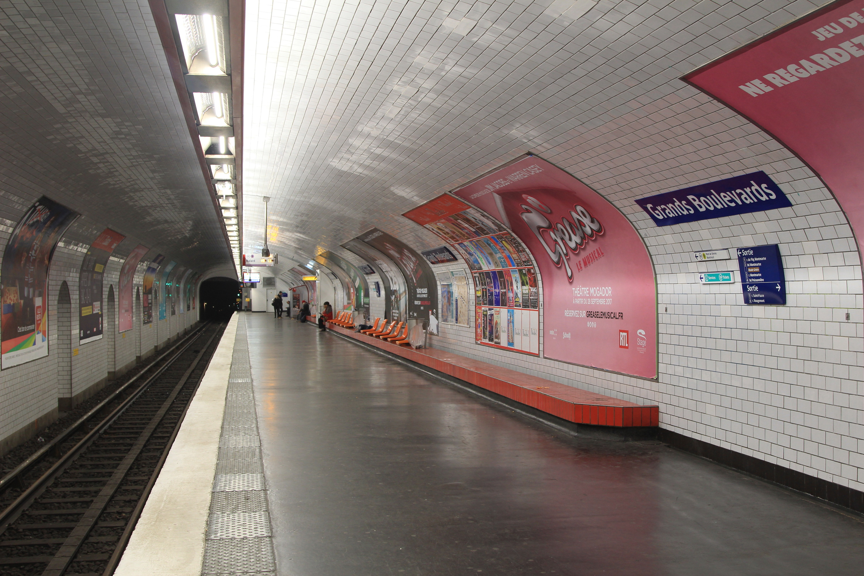 Vue du quai en direction de Balard de la station Grands boulevards de la ligne 8 du métro de Paris.